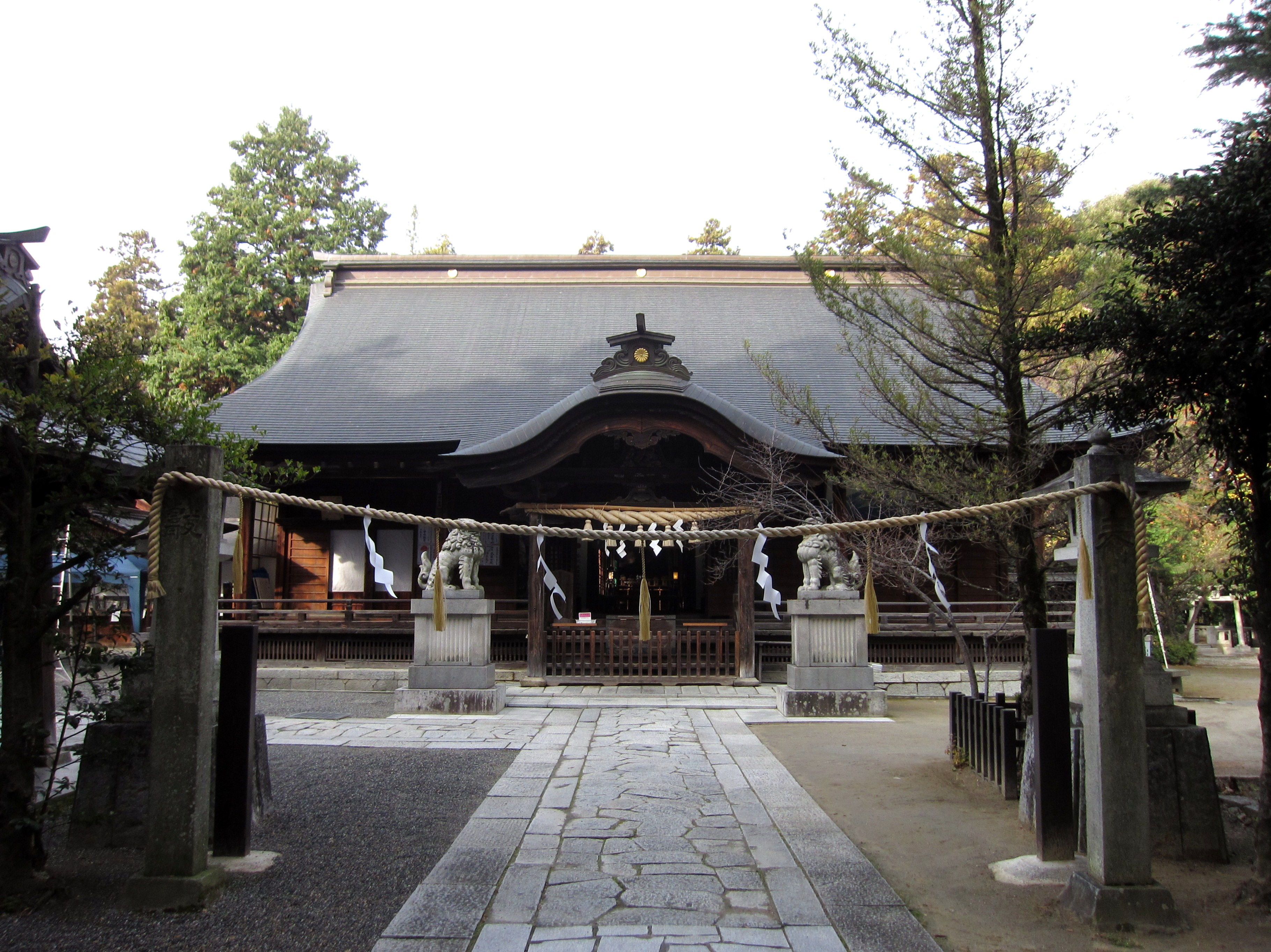 浅間神社 (笛吹市) 拝殿（注連縄背後）